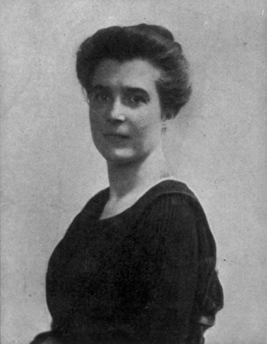 Jane Brigode (1870–1952), Belgian politician